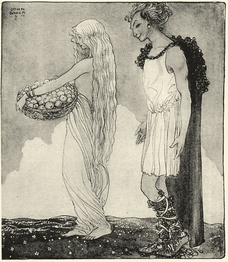 for Our Fathers' Godsaga by Viktor Rydberg